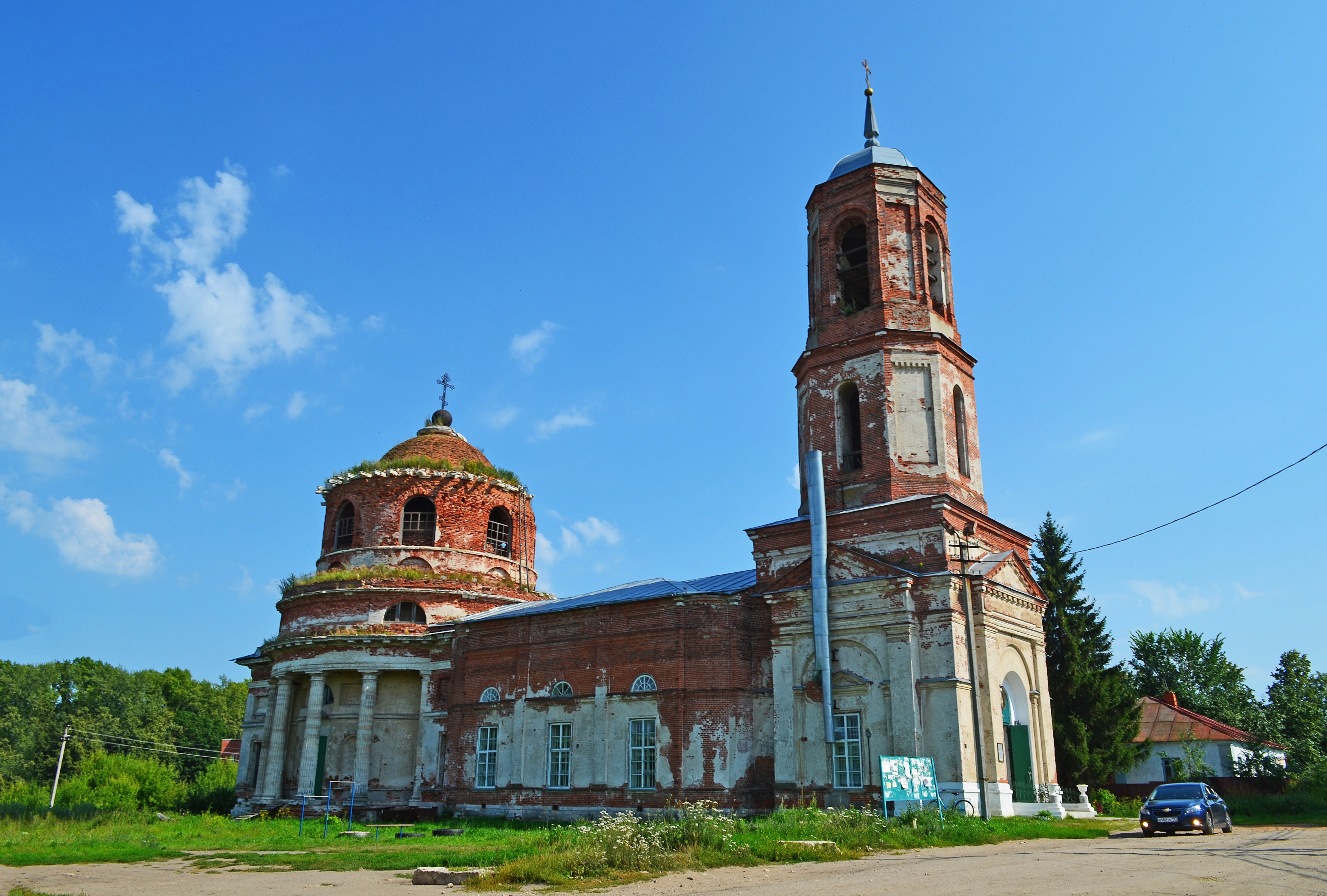 Церковь Рождества Христова: Истье, Старожиловский район, Рязанская область